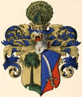 Vogdti suguvõsa aadlivapp